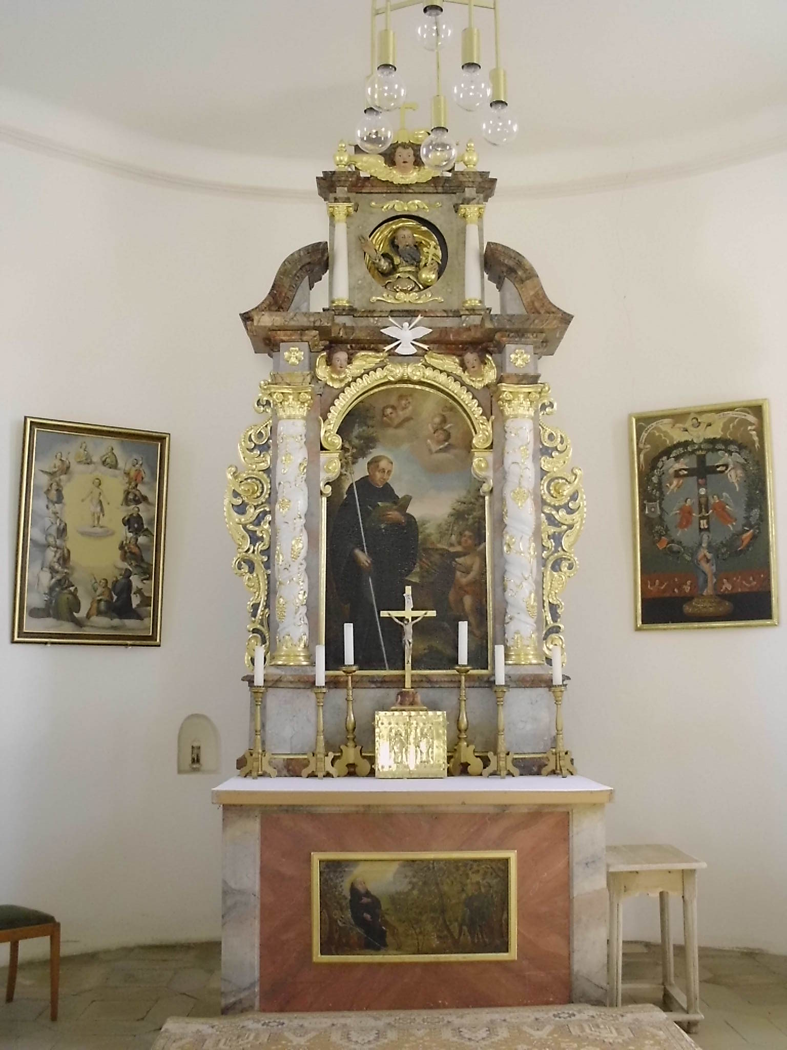 Sankt Egidi, Gemeindeteil von Raitenbuch im Landkreis Weißenburg-Gunzenhausen (Bayern), Altar der kath. Kapelle St. Ägidius